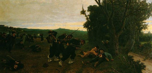 La morte di Enrico Cairoli